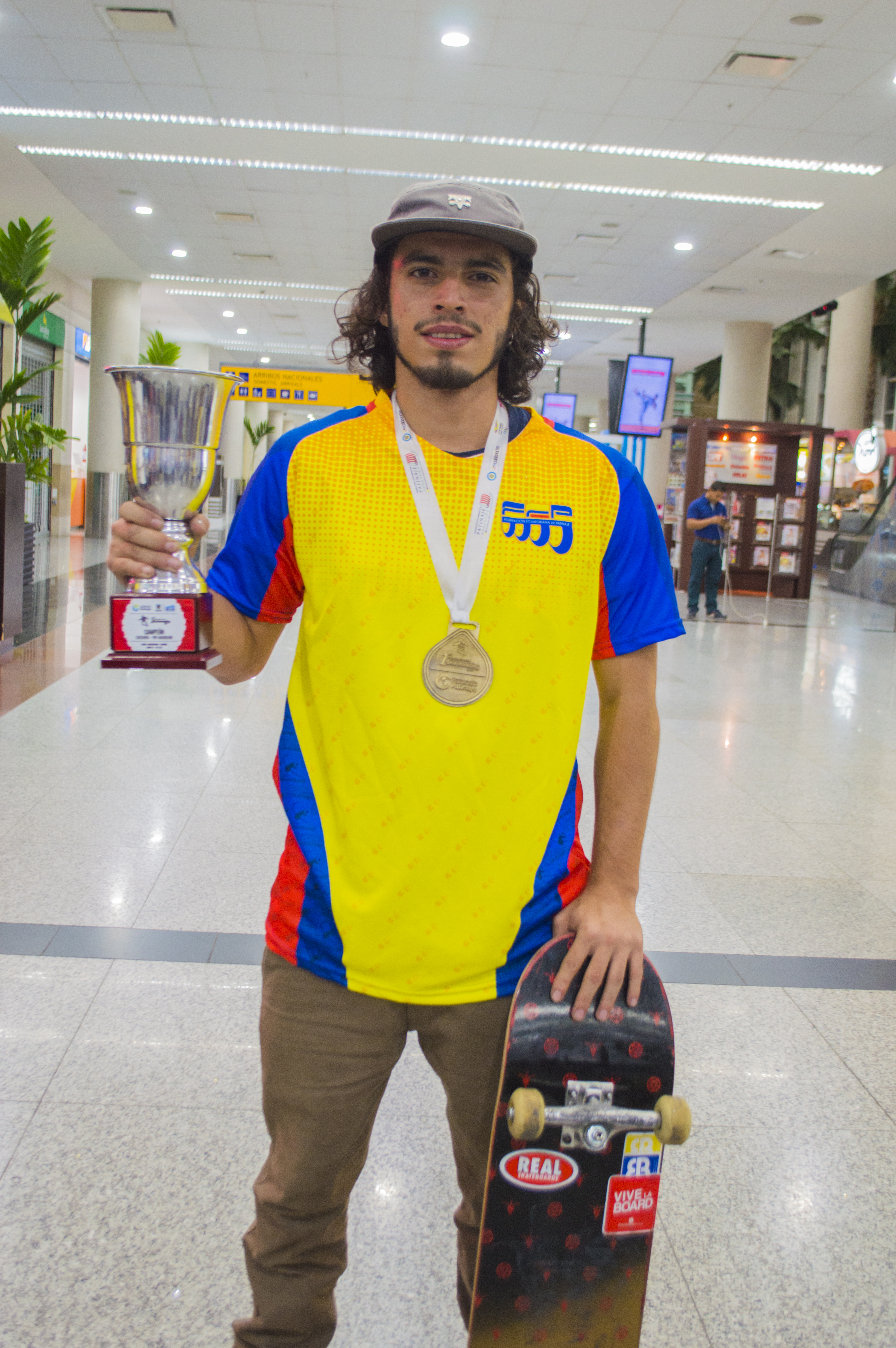 Eduardo "Napo" Mata Pino, primer campeón panamericano de skateboarding con su copa y medalla del campeonato, luego de llegar a Guayaquil, en el aeropuerto.